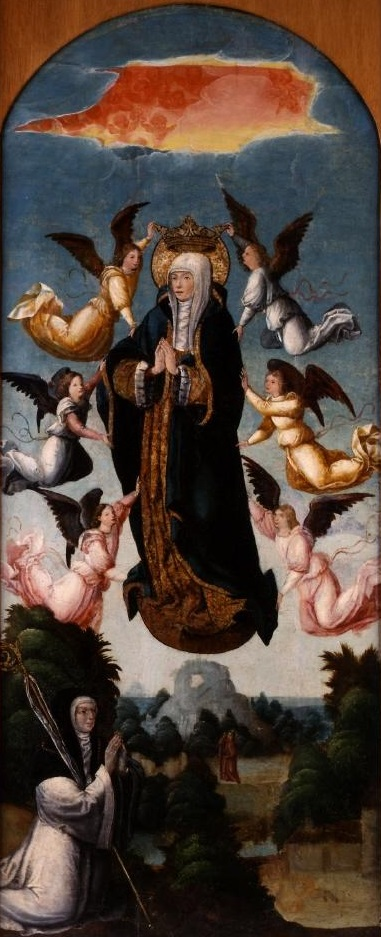 La obra representa dos episodios de la vida de la Virgen María, madre de Jesucristo, ya que en ella están presentes tanto la asunción de la Virgen en cuerpo y alma a los Cielos como su coronación.